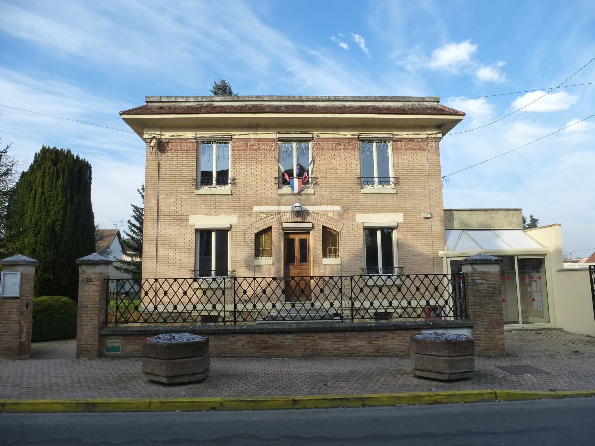 Mairie de Montry. (département de la Seine-et-Marne, région Île-de-France).